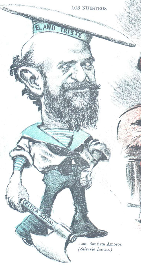 Caricatura.